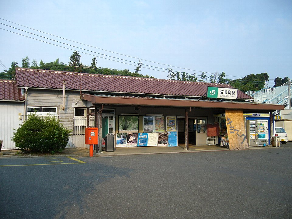 Sanukimachi Station, Futtsu, Chiba, Japan